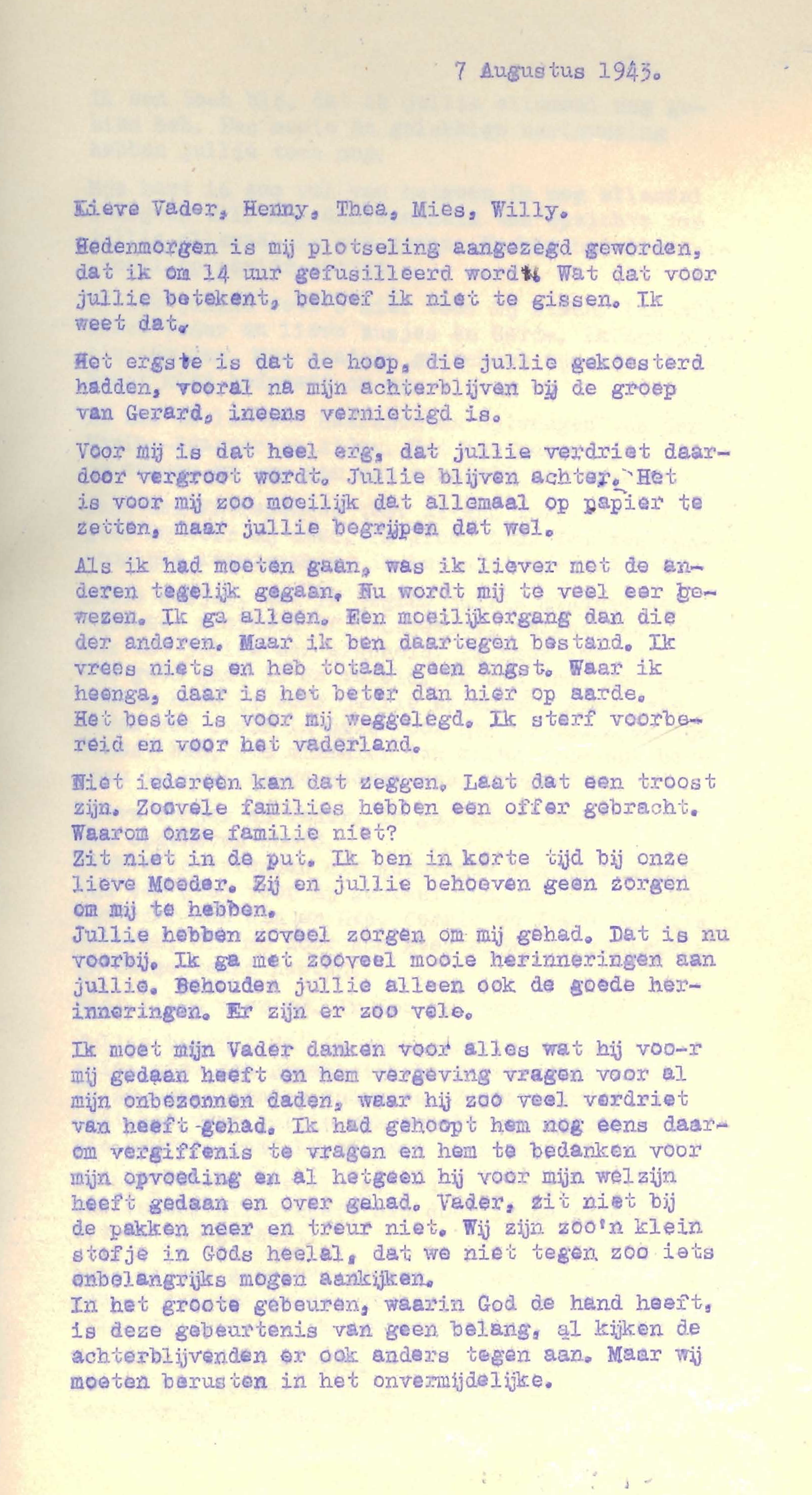 Pagina 1 van de afscheidsbrief Ardien Moonen - 7 aug 1943